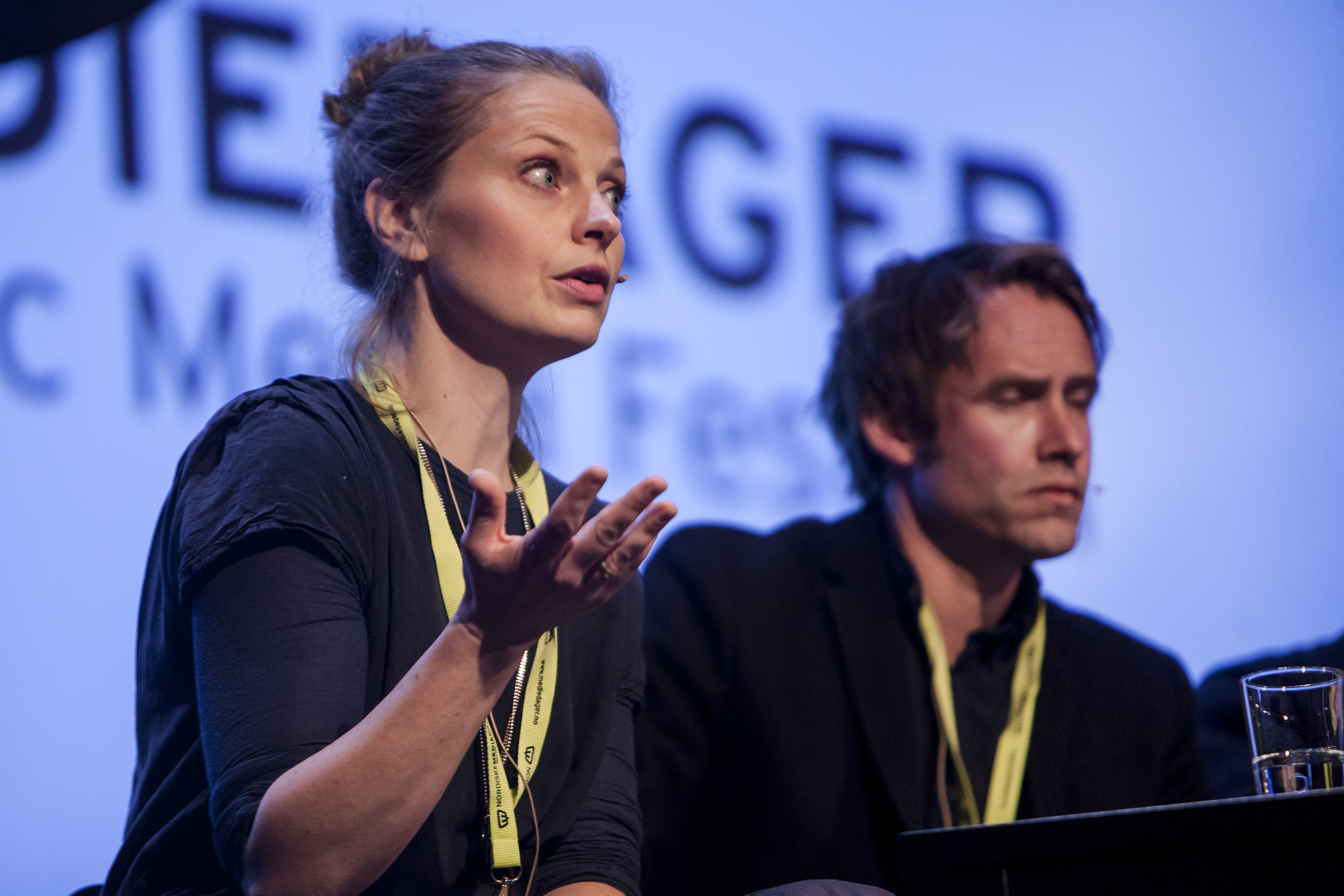 Nordiske Mediedager 2013